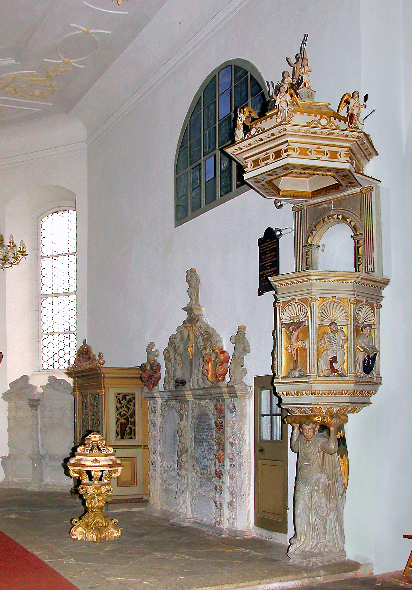 16.10.2006 01990 Großkmehlen): Pfarrkirche St. Georg (1716-1718 auf gotischem Kern). Altaraufsatz um 1620, Kanzel 16. Jh., Taufstein 1718, Epitaph 17. Jh. [DSCN12045.TIF]20061016075DR.JPG(c)Blobelt